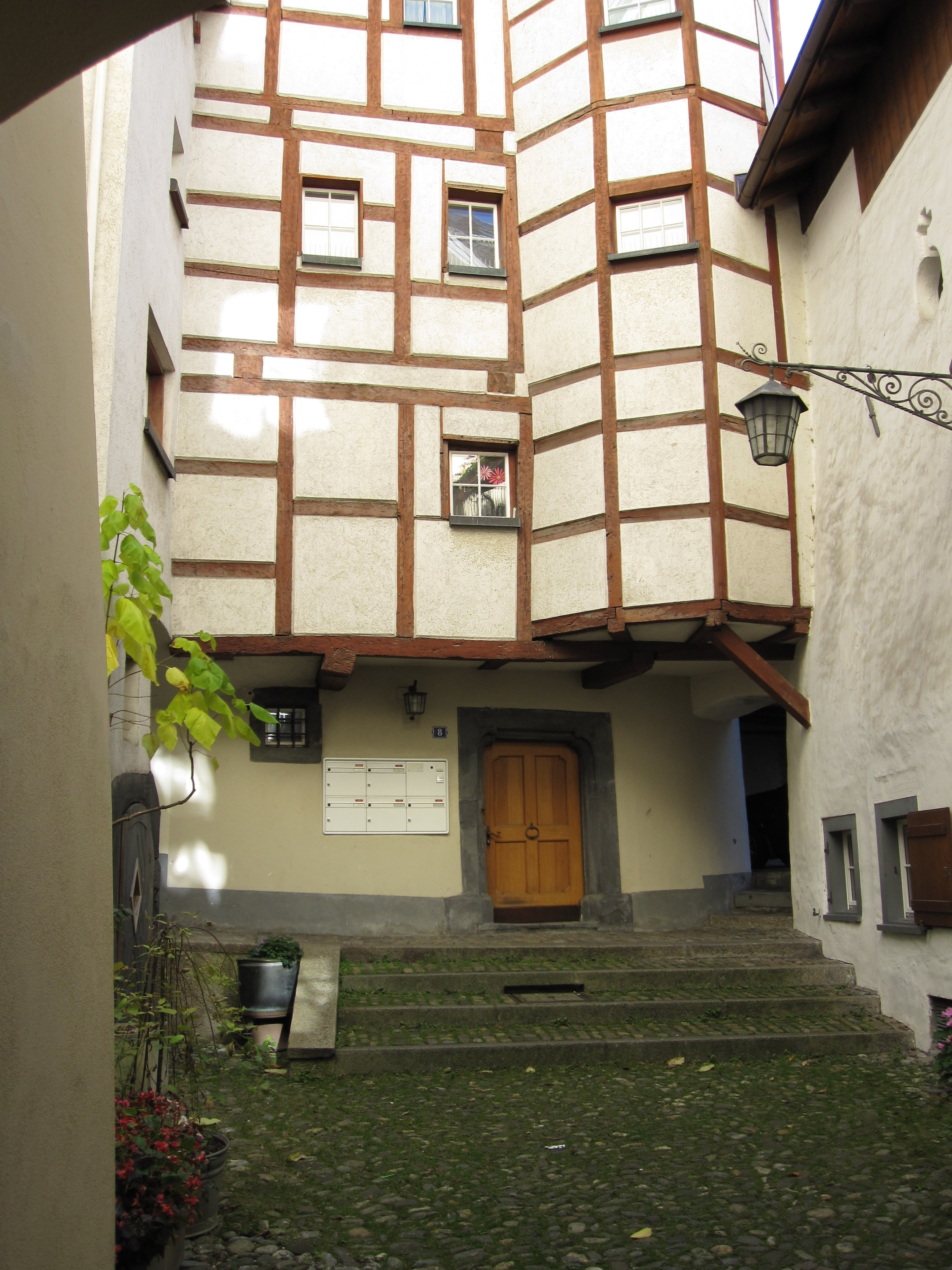 Bärenloch in Chur (Kanton Graubünden, Schweiz)